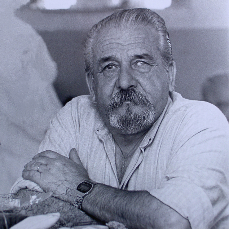 Mis más sinceras felicitaciones por haber logrado retratar, mejor que nadie, la personalidad de Muñiz Alique (primavera de 1992). Infinitas gracias Norberto.